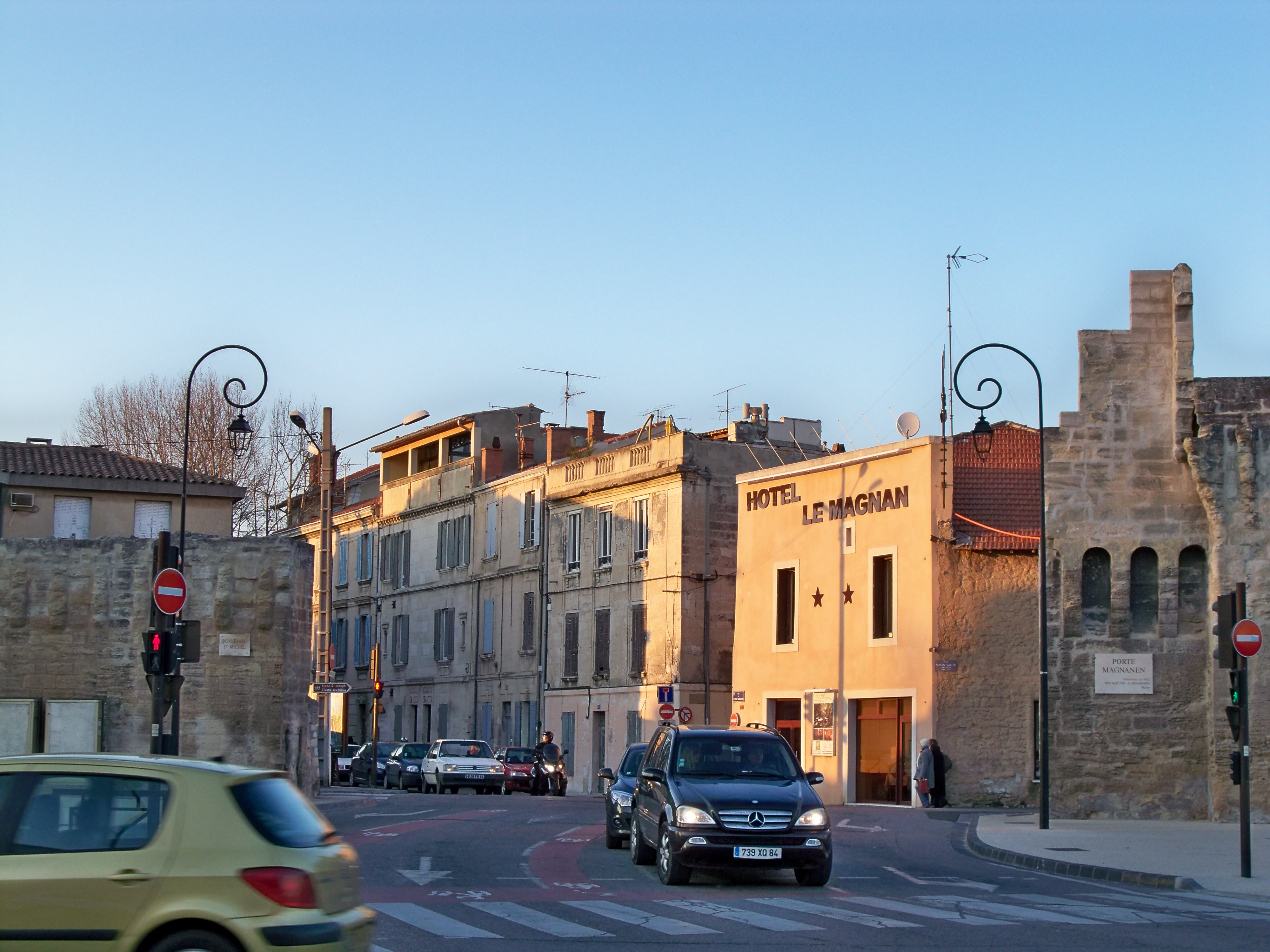 Porte Magnanen des remparts d'Avignon, Vaucluse, France